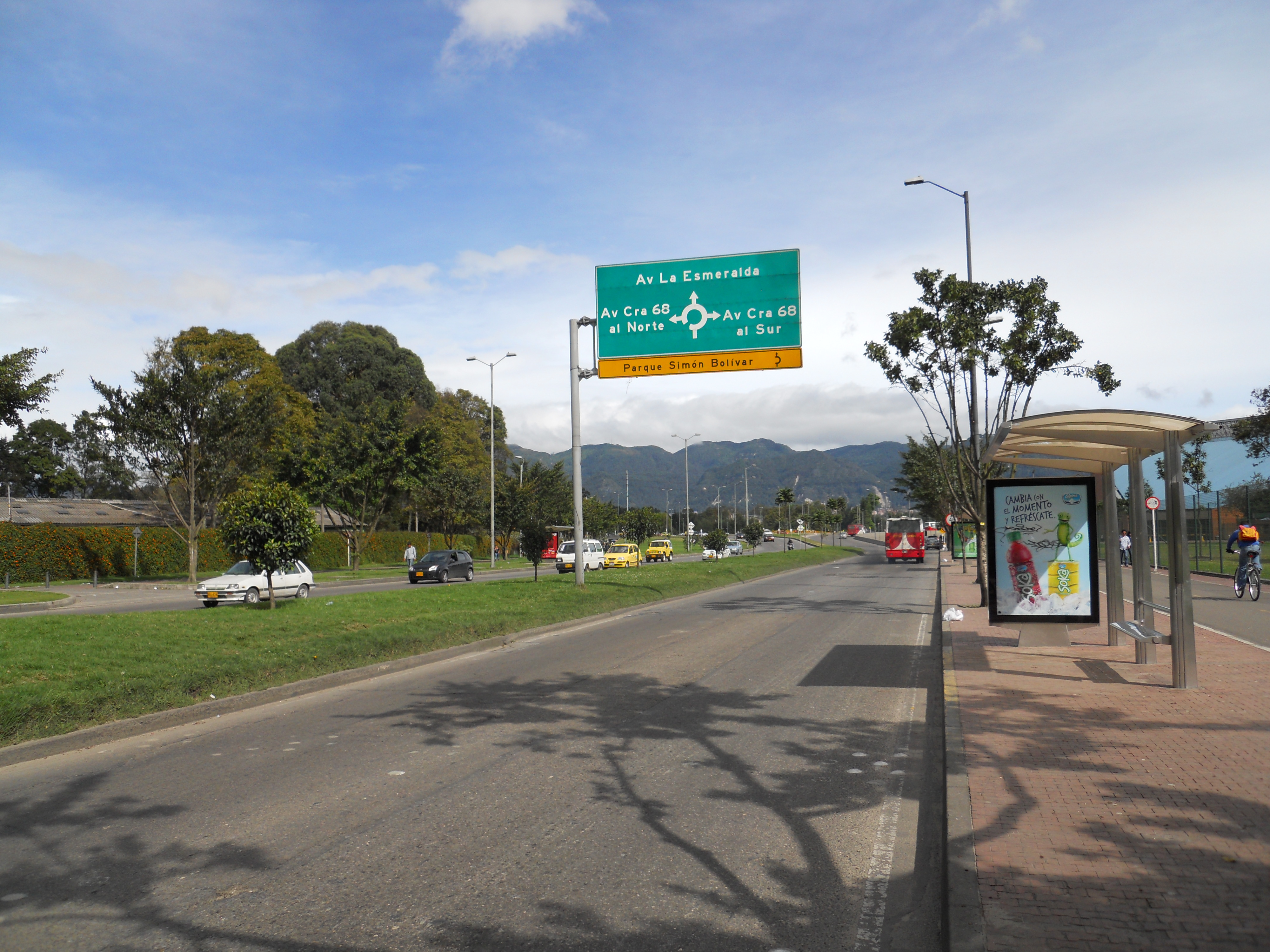 Avenida 63 con carrera 68 en la localidad de Engativá.